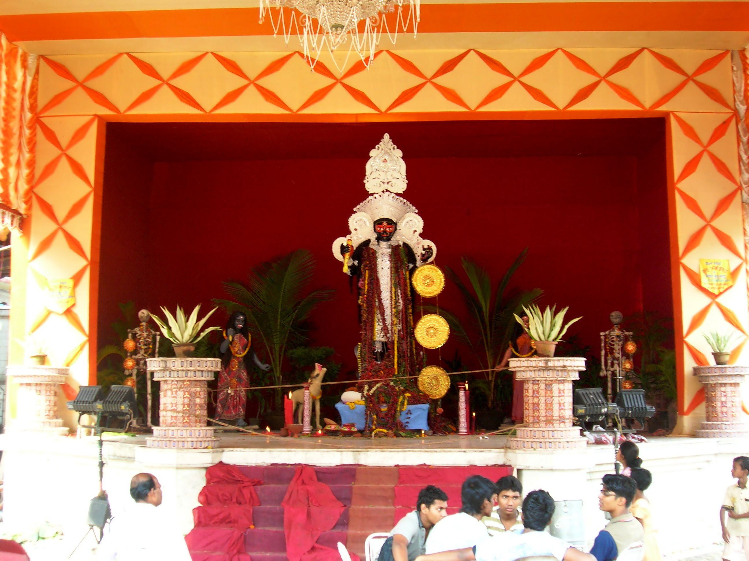 Smashankali Puja at Keoratala Burning Ghat